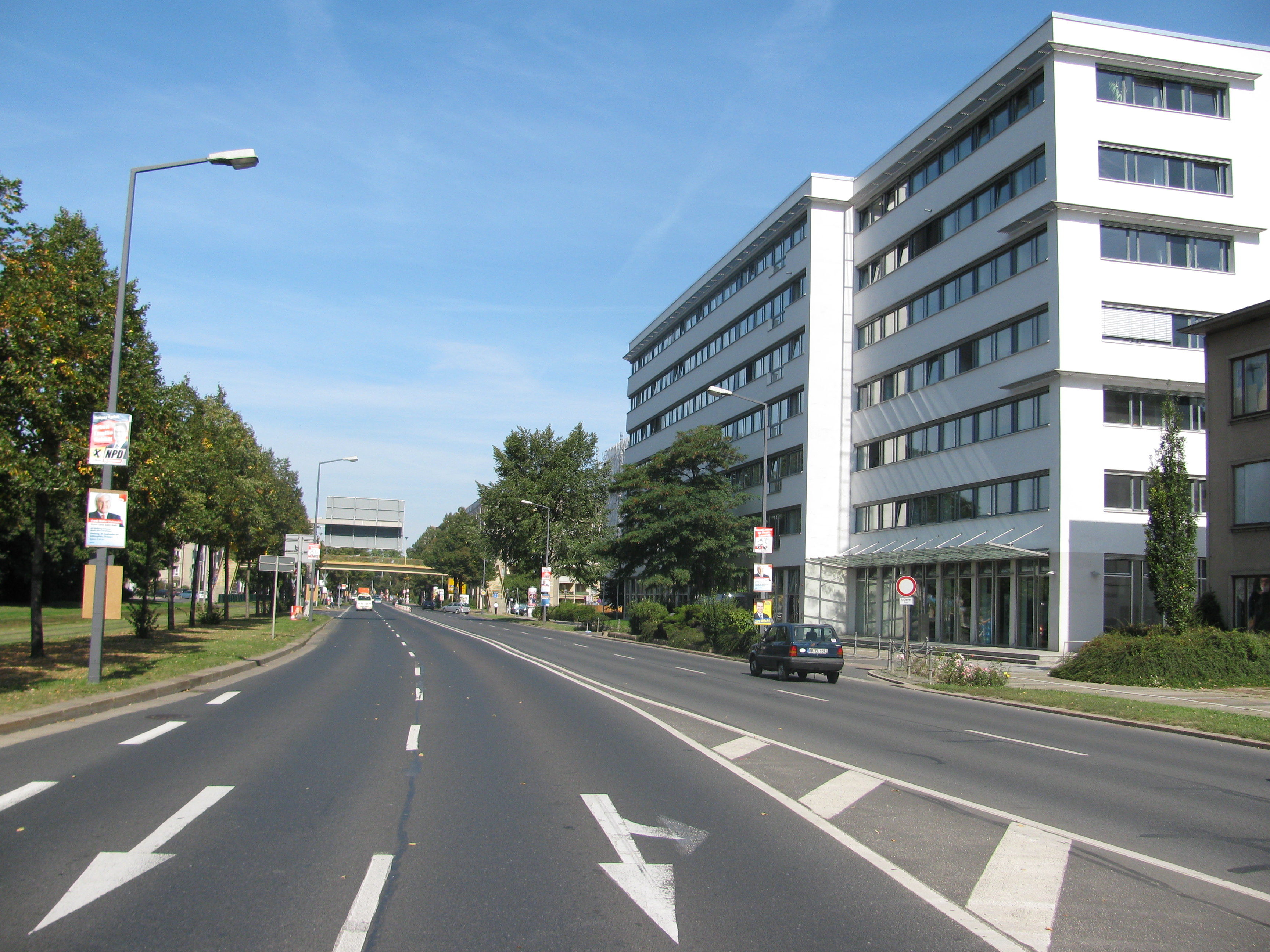 Albertstraße, Dresden, Stadtteil Innere Neustadt. Sächsisches Staatsministerium für Soziales (Sozialministerium Sachsen).